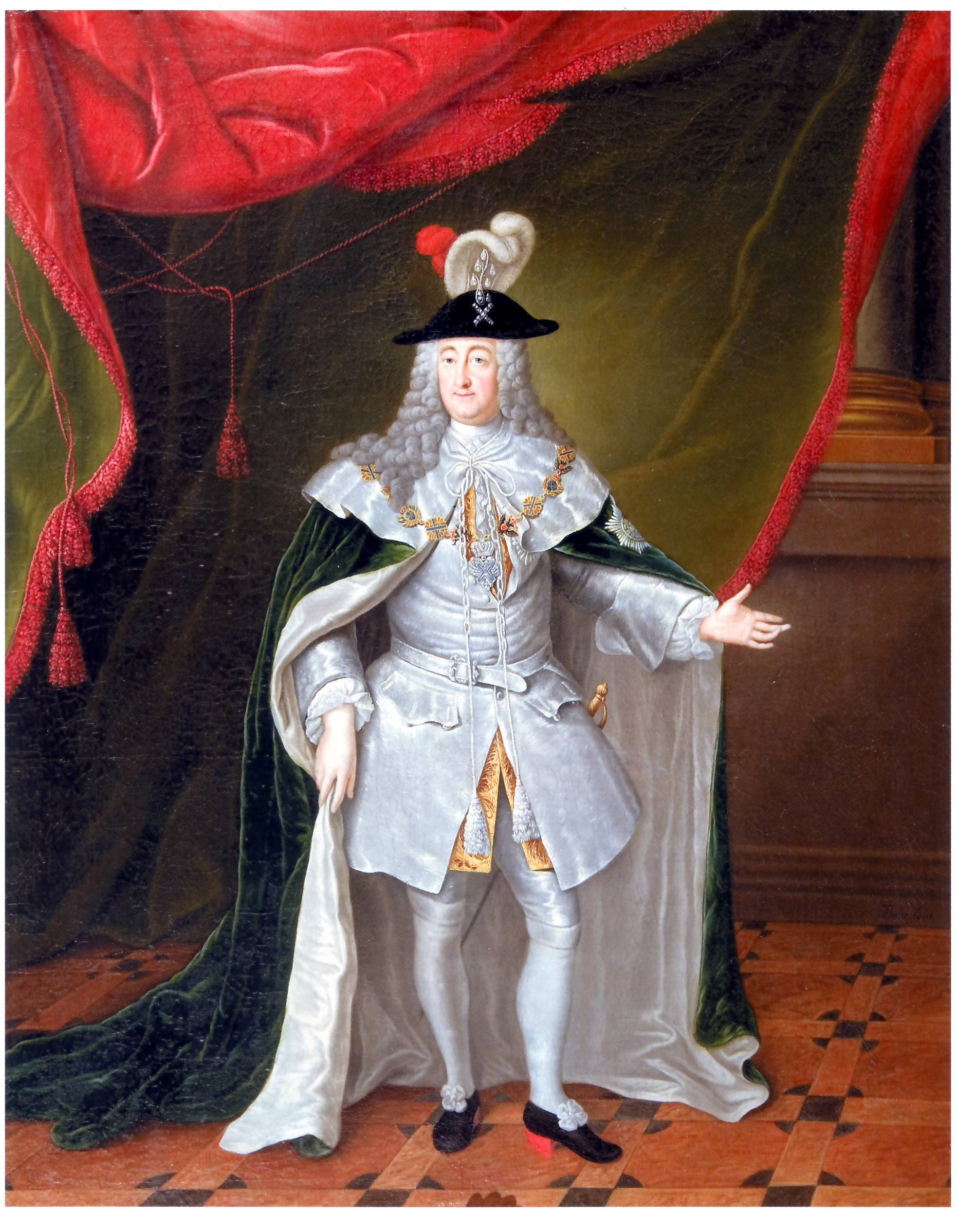 Бер, Иоганн Филипп (ум. 1756). Портрет А.И. Остермана, 1730-е. Коллекция Подстаницких.